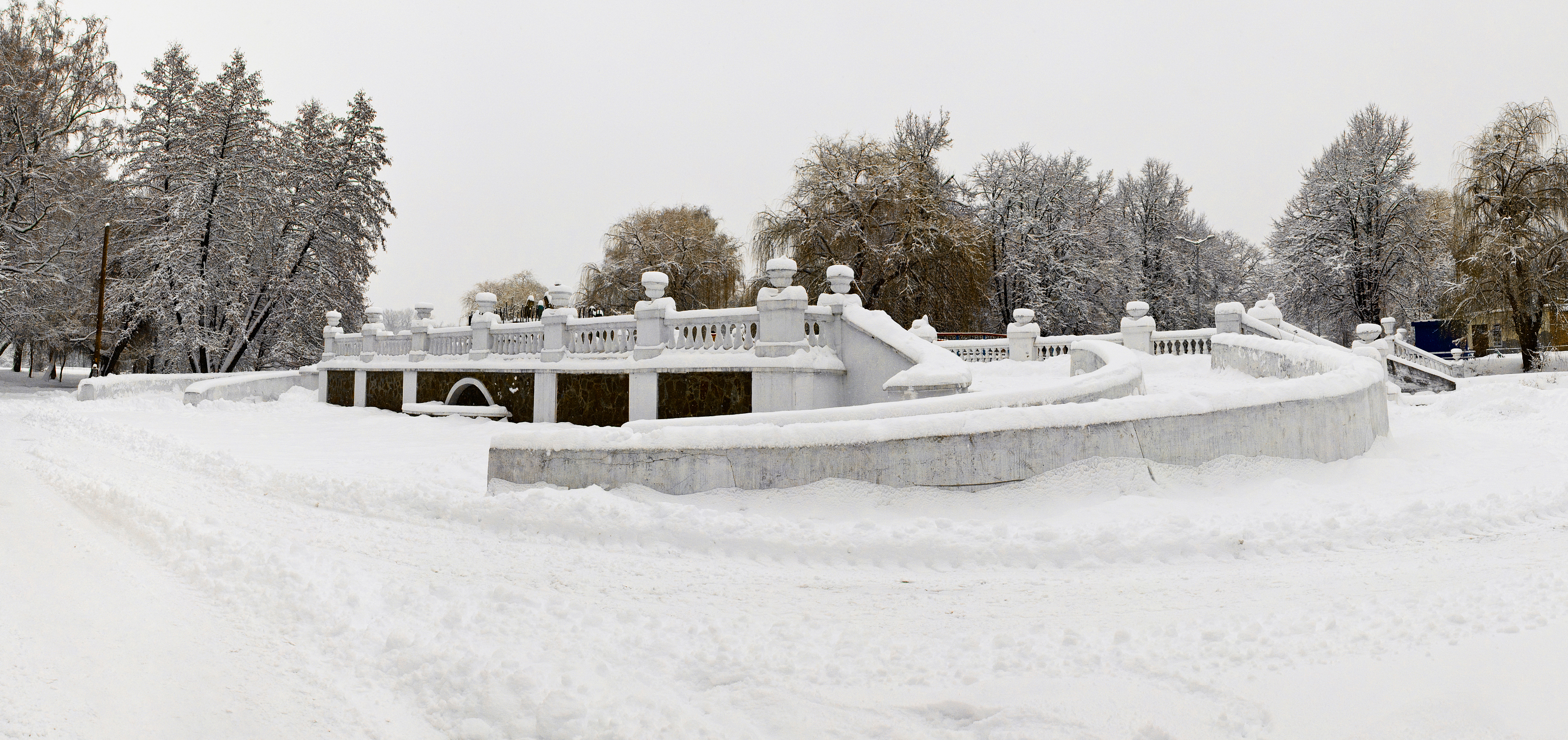 Парк ім.. М. Чекмана, м. Хмельницький по вул. Котовського